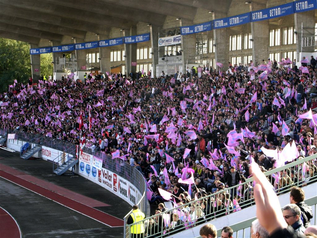 La tribune SETAM du Parc des Sports d'Annecy (Haute-Savoie, France) lors du match de football (ligue 1) Thonon-Gaillard FC/Paris-Saint-Germain ( 2-2) le 18 septembre 2011.